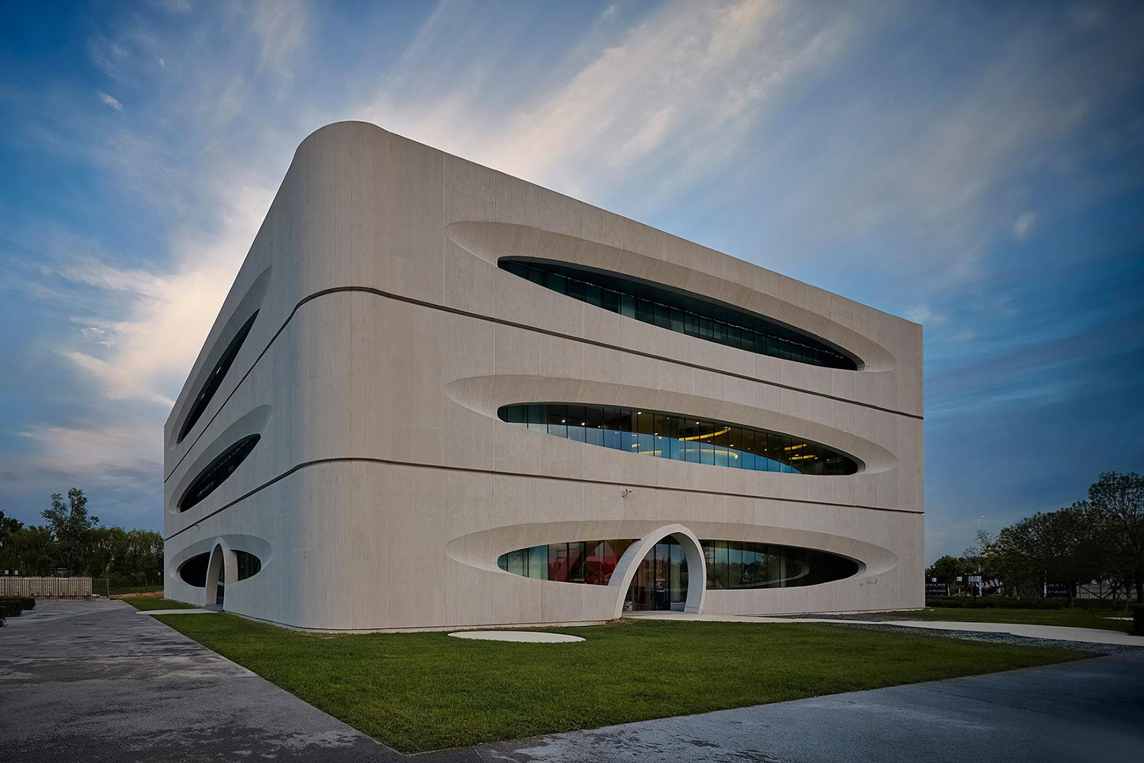 IMMEUBLE PINGGU DESIGN